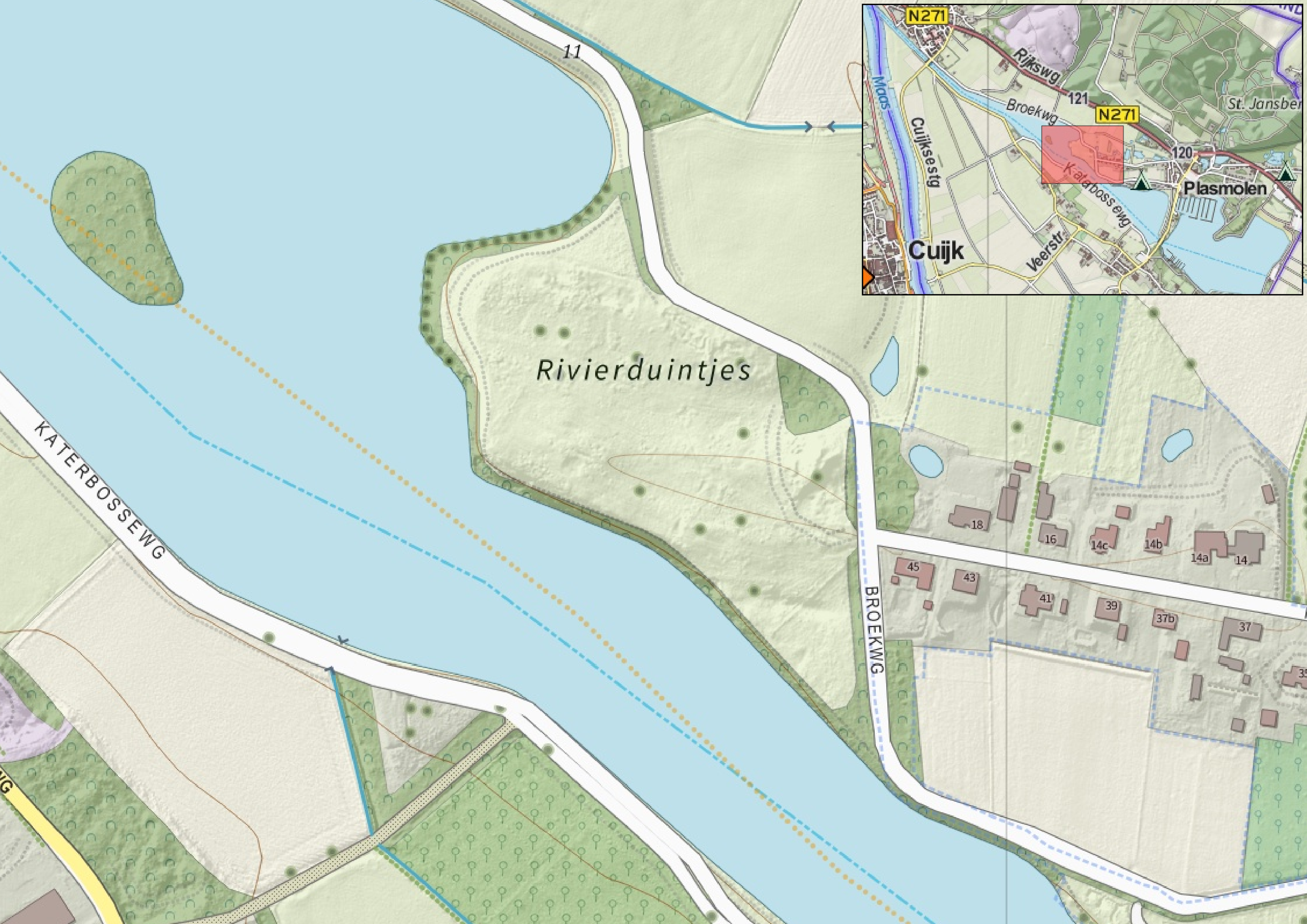 Topografische kaart van de Rivierduintjes (natuurgebied). Bron: J.W. van Aalst, Kaartbeeld samengesteld uit de open geodata van de Top10NL en Top25namen (Basisregistratie Topografie, Kadaster 28-apr-2014), Creative Commons BY licentie. Gebouwvlakken uit open geodata BAG extract (8-jun-2014). Wegen uit de Open Street Map (8-jun-2014), OpenStreetMap community. Reliëfschaduw uit de Actuele Hoogtekaart AHN2 (8-mrt-2014). Samenstelling en kleurenschema: Jan-Willem van Aalst, met QGIS2. Zie ook de Legenda.